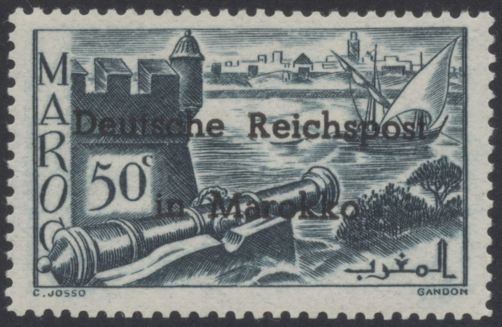 Britische Propagandafälschung für Deutschland. Gefälschte Aufdrucke auf Marken von Französisch-Marokko, um eine angeblich bevorstehende deutsche Besetzung von Marokko anzukündigen.